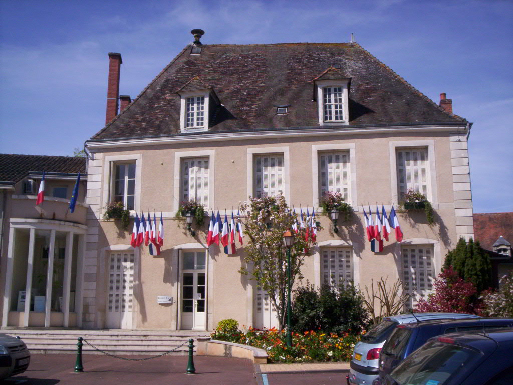 Hôtel de ville de Montmorillon, Vienne, France (86)